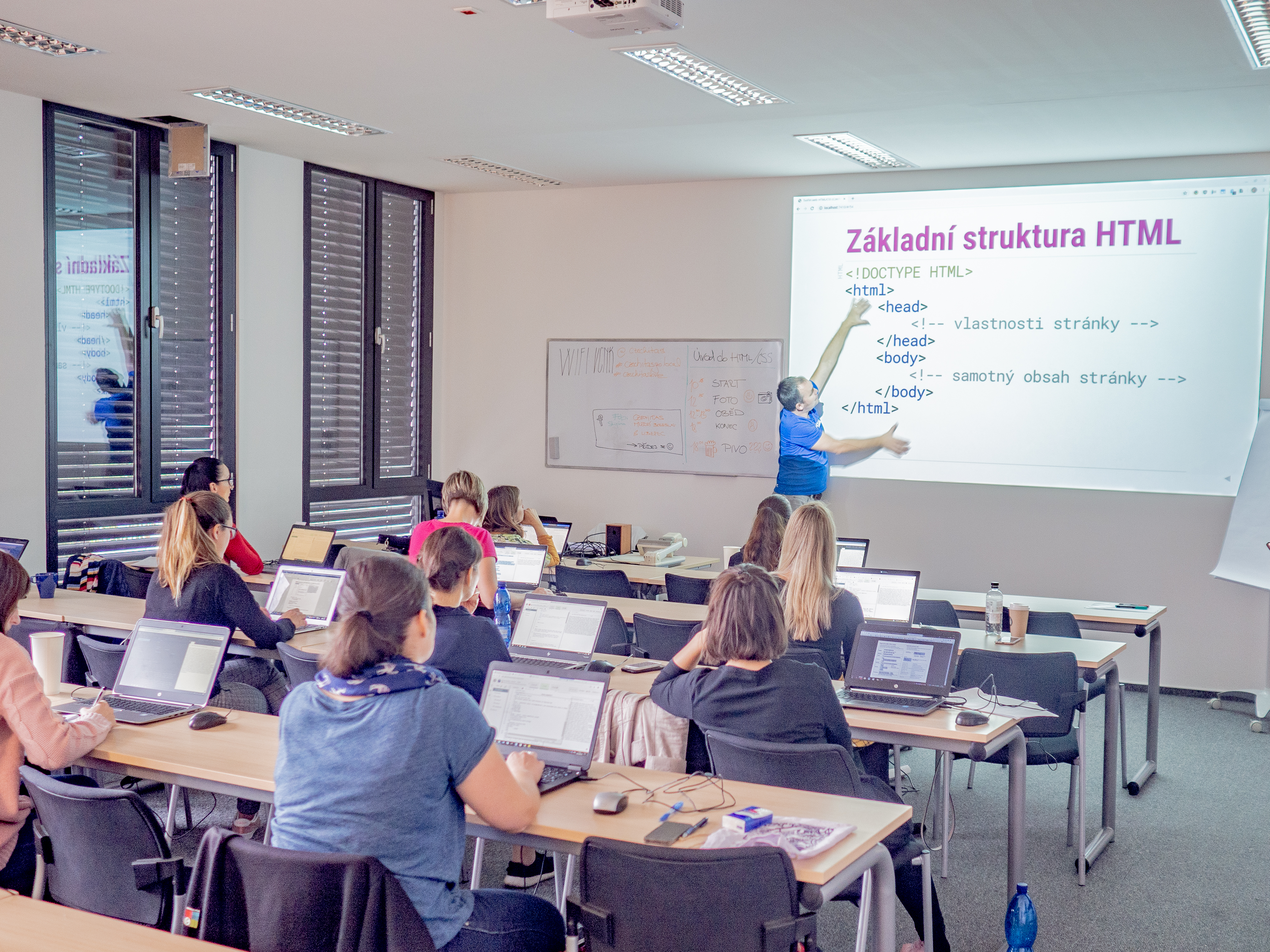 Workshop Úvod do HTML a CSS